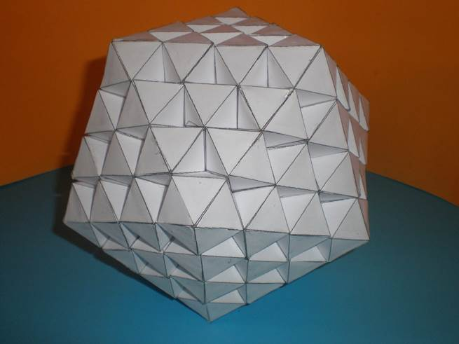 A második ikozaéder látványa